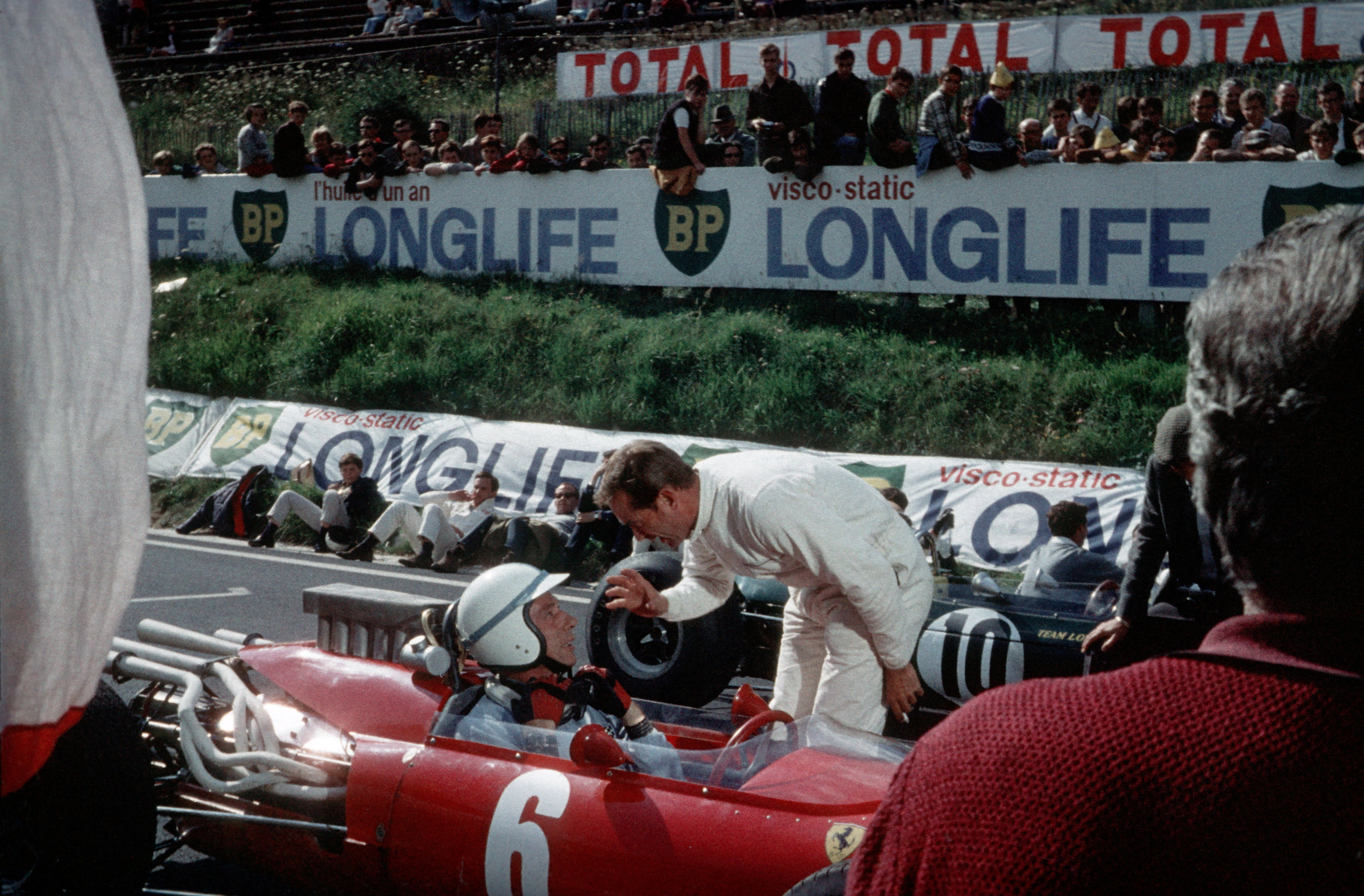 L'acteur français Yves Montand lors du tournage du film Grand Prix, en 1966 à Royat (près du circuit de Charade).